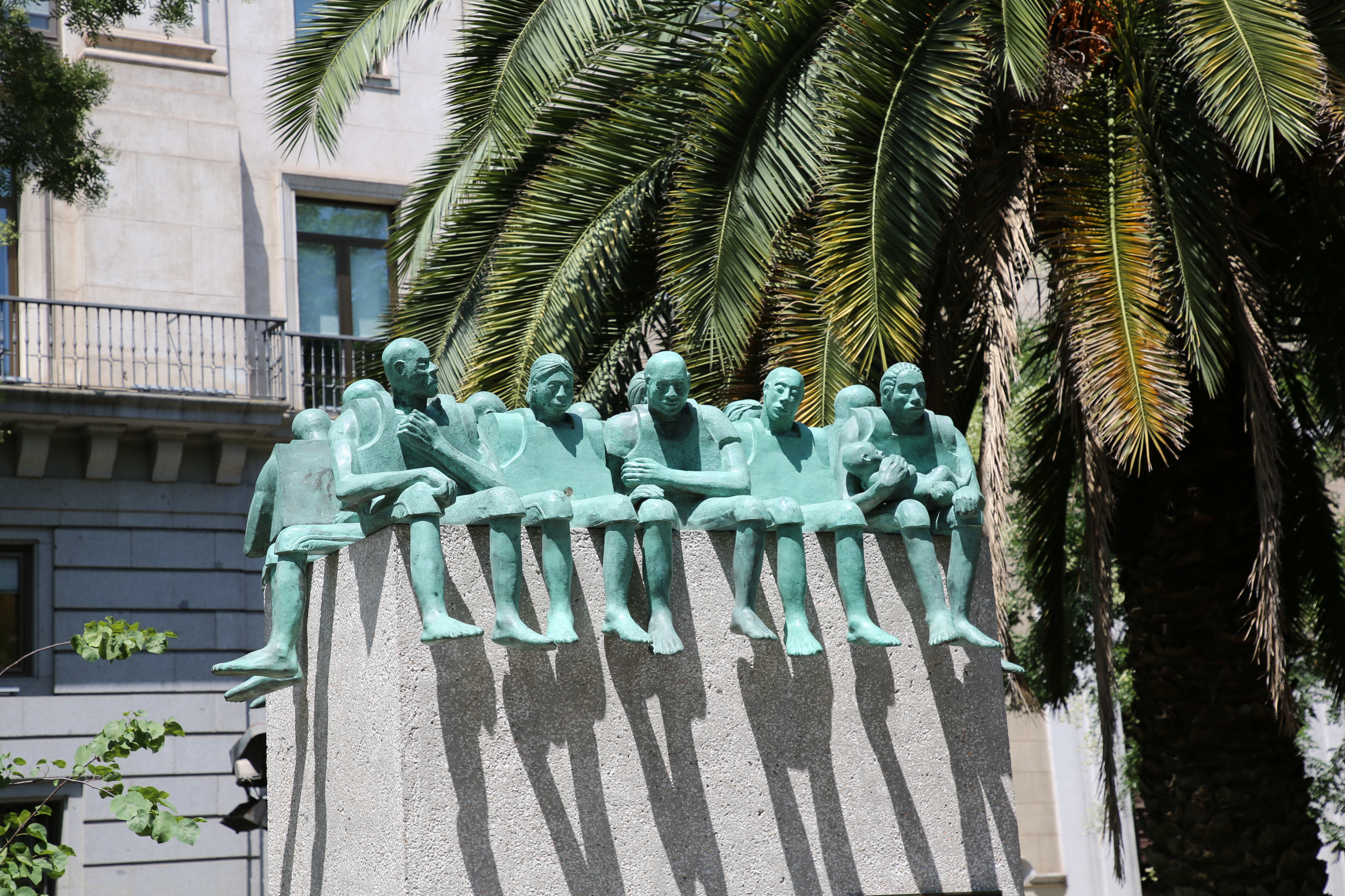 Refugiados, escultura de Bel Borba en el paseo de Recoletos de Madrid